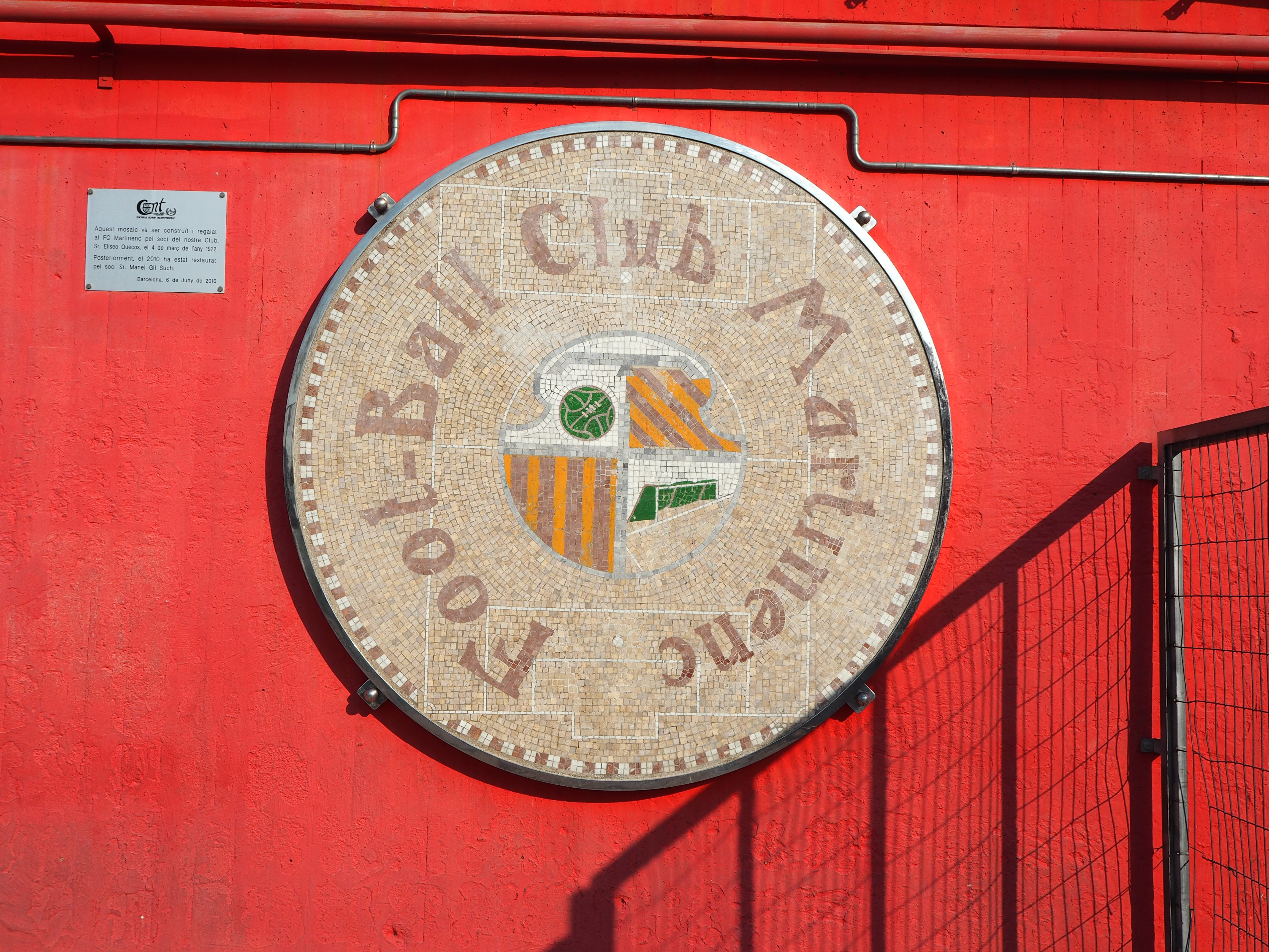 Inscripció: Aquest mosaic va ser construït i regalat al FC Martinenc pel soci del nostre Club, Sr. Eliseo Quecos, el 4 de març de l'any 1922. Posteriorment, el 2010 ha estat restaurat pel soci Sr. Manel Gil Such. Barcelona, 6 de juny de 2010 fcmartinenc.cat/ Gràcies a tots pels comentaris i els favorits. Thanks all for your comments and faves. Gracias por vuestros comentarios y favoritos. Vielen Dank für Ihre Kommentare und Faves. Merci à tous pour vos commentaires et vos faves. Grazie a tutti per i vostri commenti e faves.